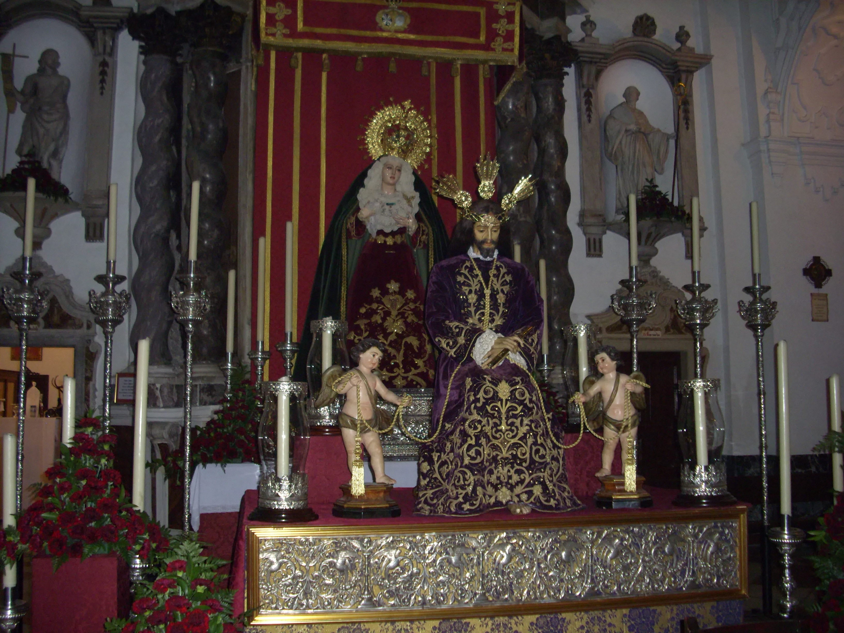 Fotografía propia realizada por Pedro